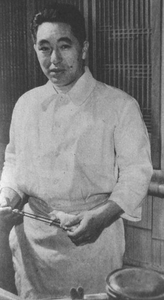 安達五郎